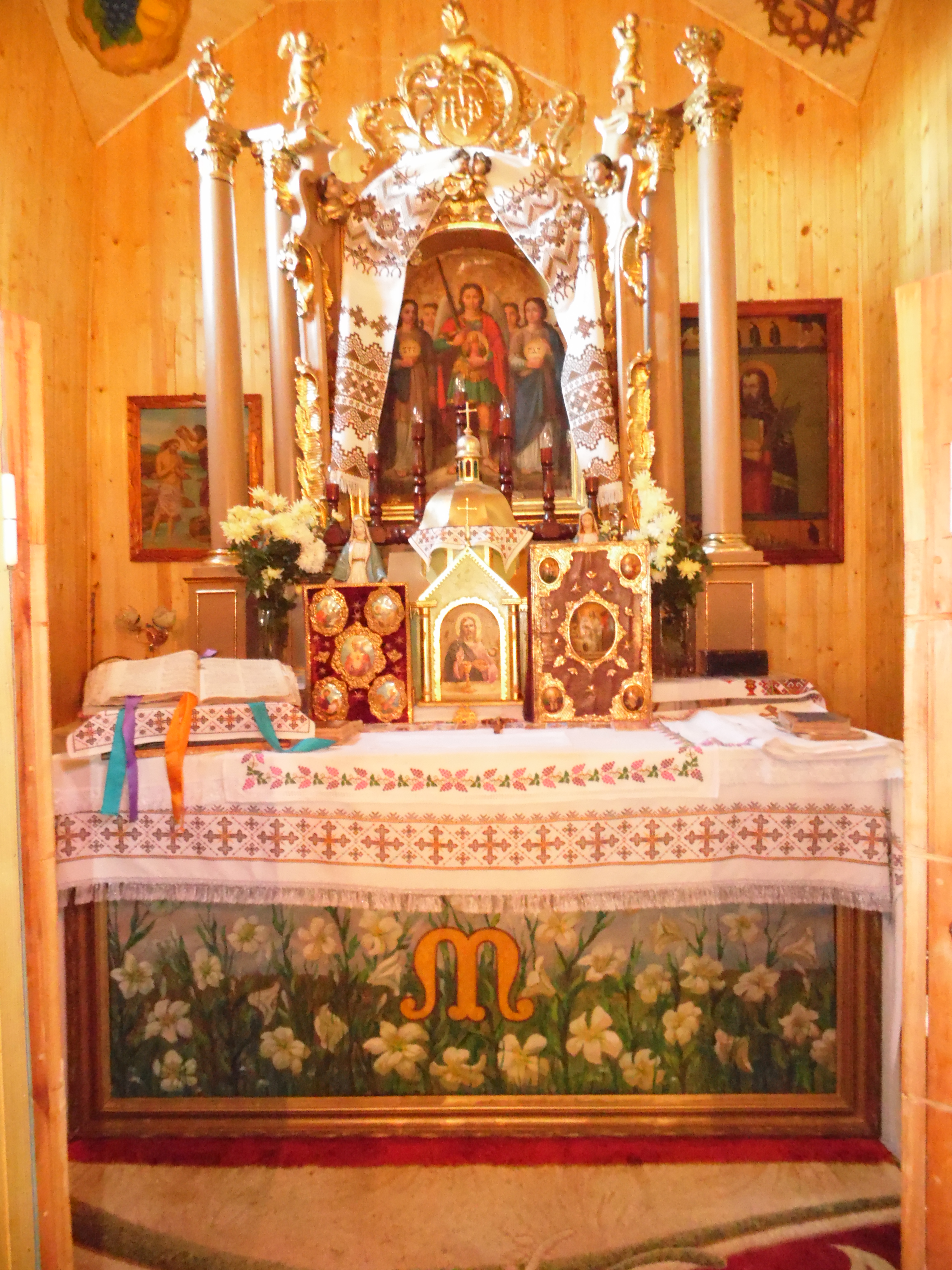 Перстіл церкви св. архістратига Михаїла с. Мужиловичі